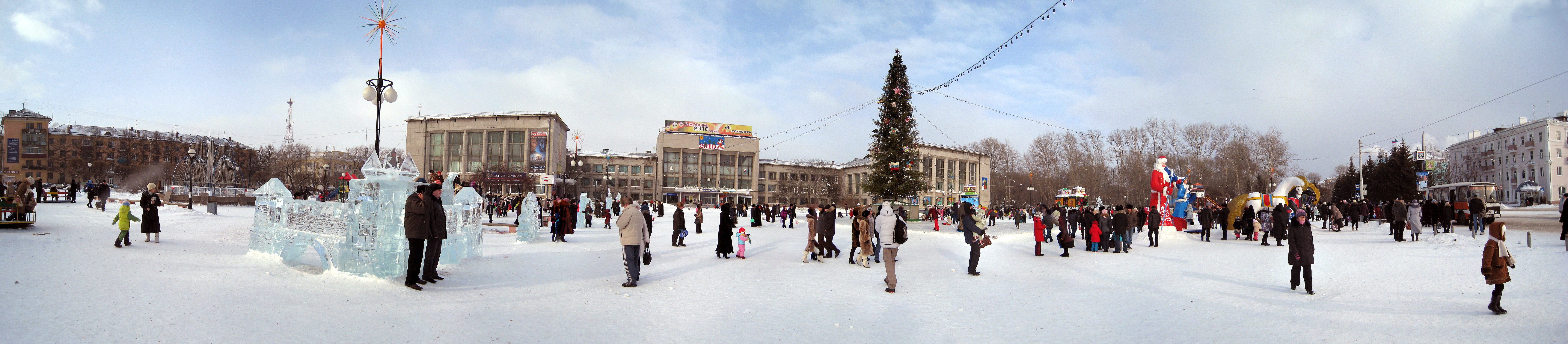 Комсомольск на Амуре.Площадь Юности